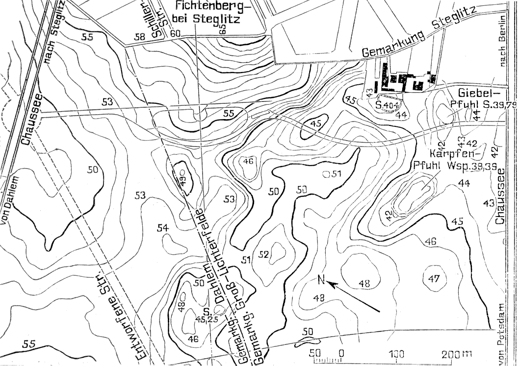 Botanical Garden in Berlin Native nameBotanischer Garten, Berlin-DahlemLocationBerlinCoordinates52° 27′ 18″ N, 13° 18′ 12.96″ E Established1899Website